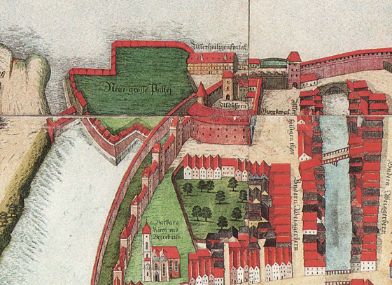 Ulica Cieszyńskiego (Burgkwal) na planie Wrocławia autorstwa Weihnera z roku 1562